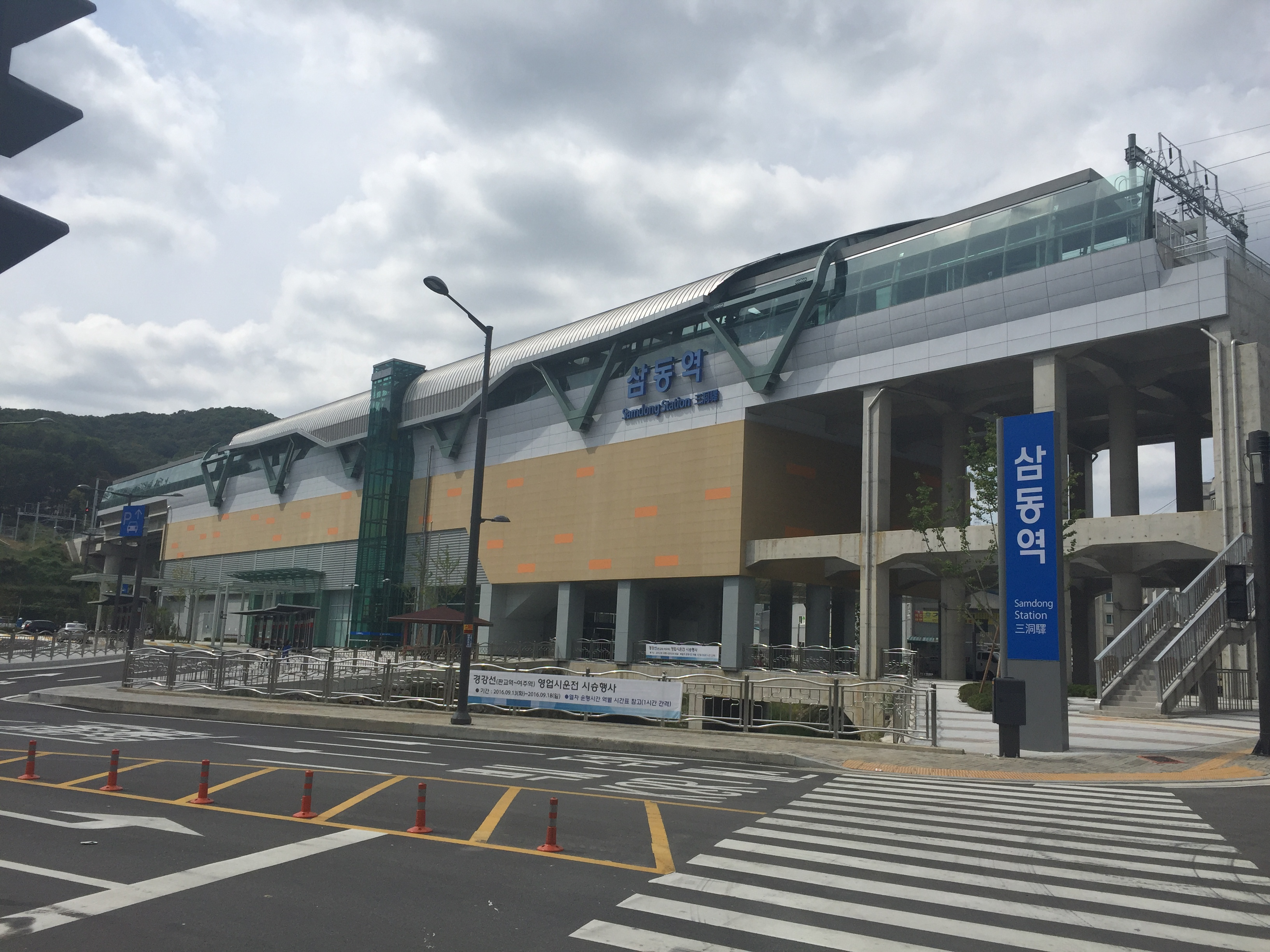 삼동역 역사 외관입니다.